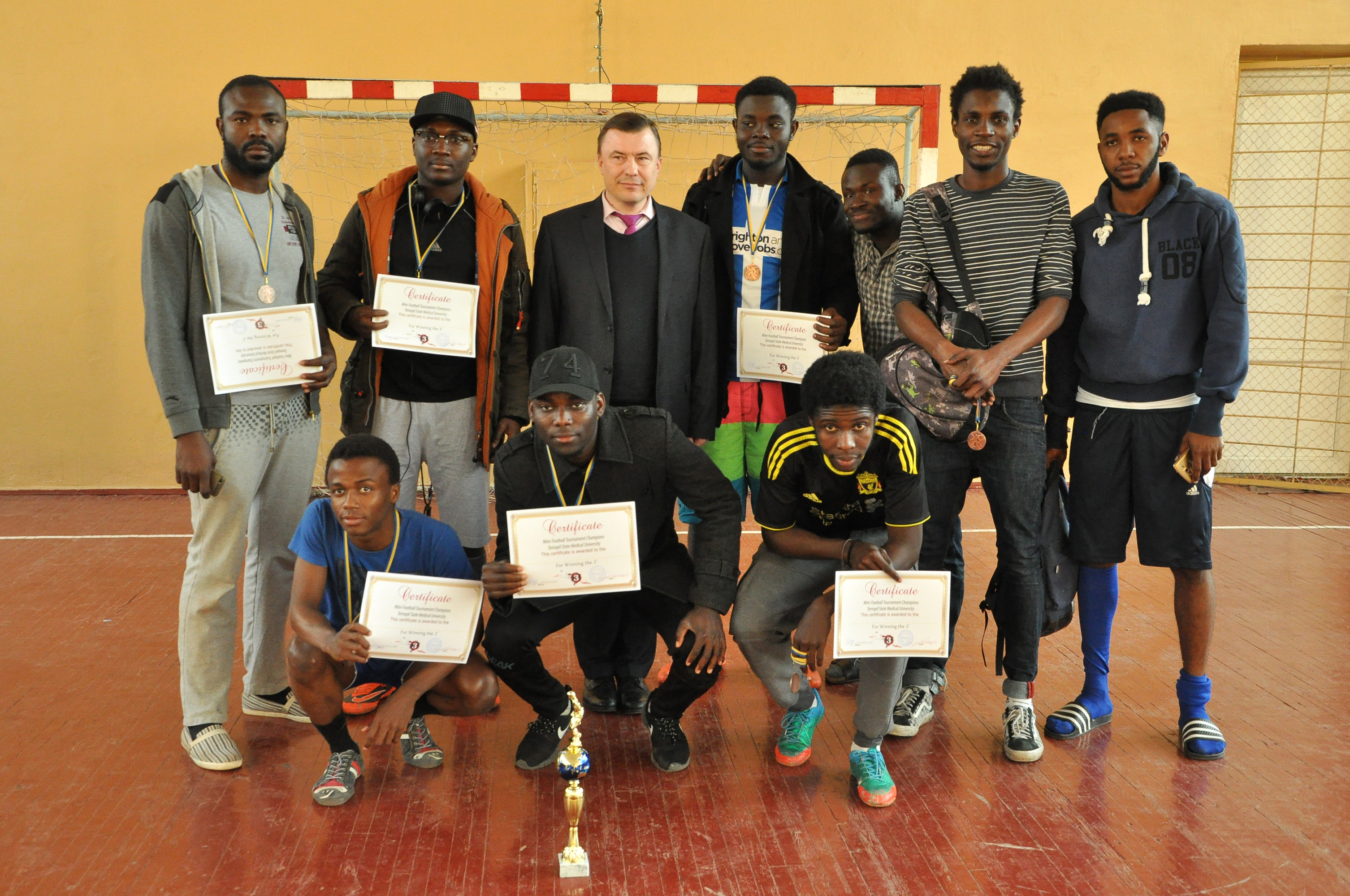 Міні-футбол «Ліга чемпіонів» Тернопільського державного медичного університету імені І. Я. Горбачевського. Півфінальні та фінальний поєдинки 26 квітня 2016 року. ІІІ місце — команда з Нігерії.